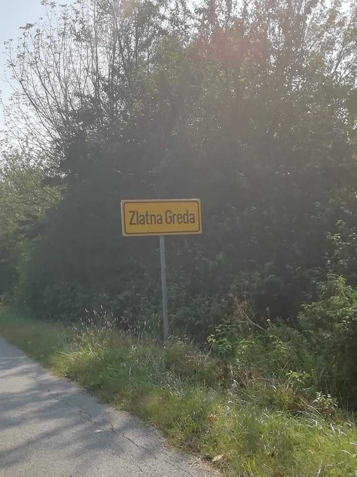 Srpskohrvatski / српскохрватски: Zlatna Greda tablica